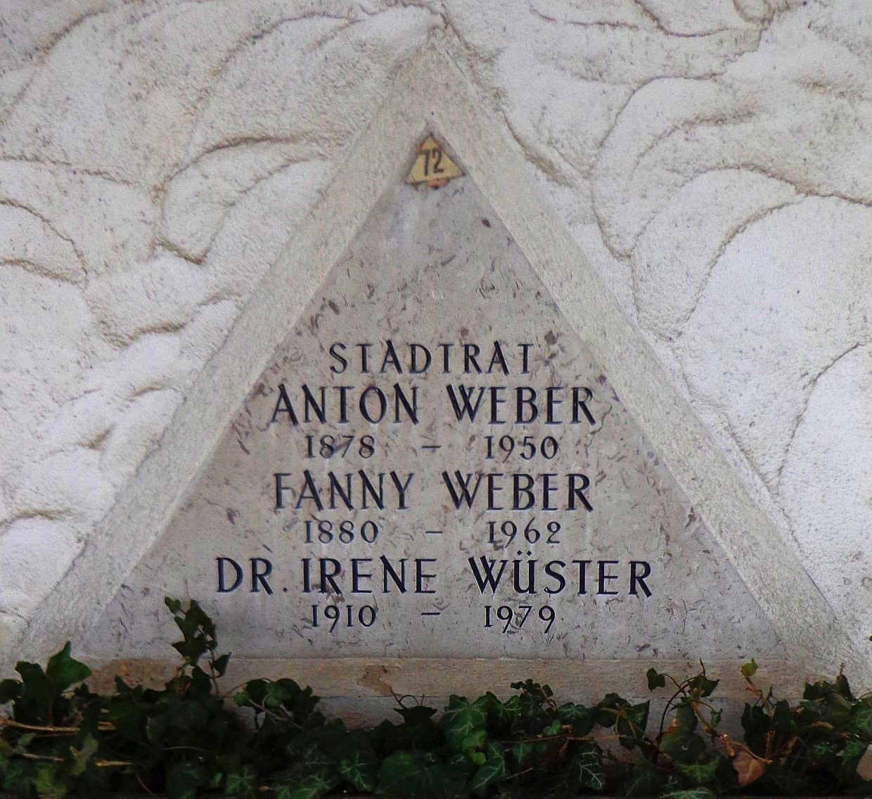 Feuerhalle Simmering - Arkadenhof (Abteilung ALI) - Ehrengrab von Stadtrat Anton Weber (1878–1950)